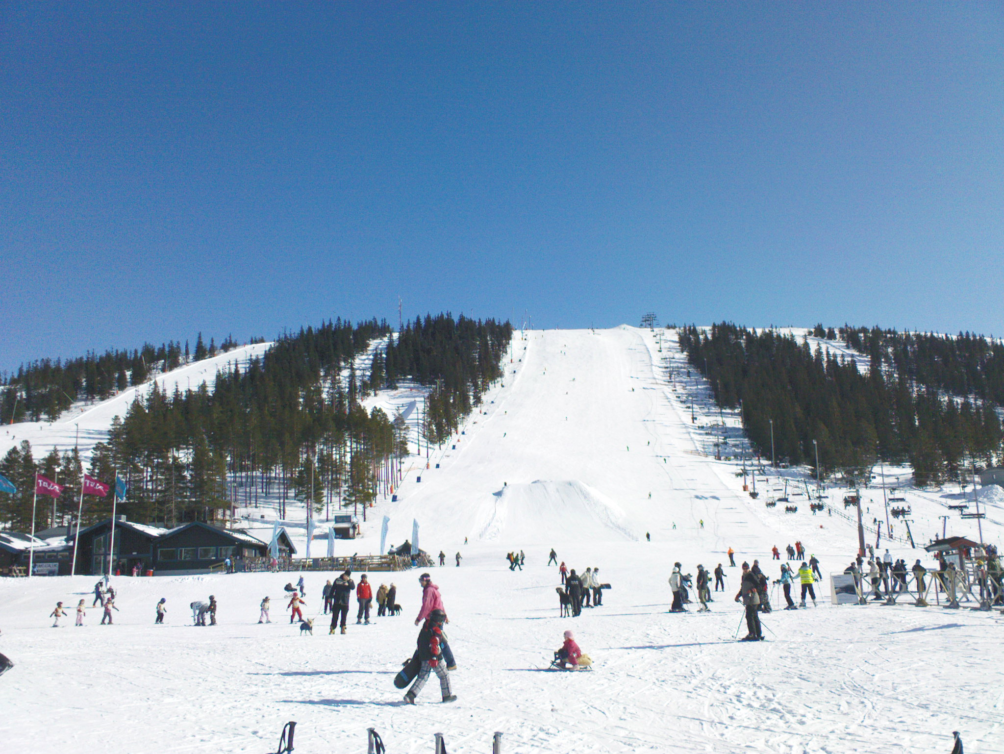 TANDÅDALEN